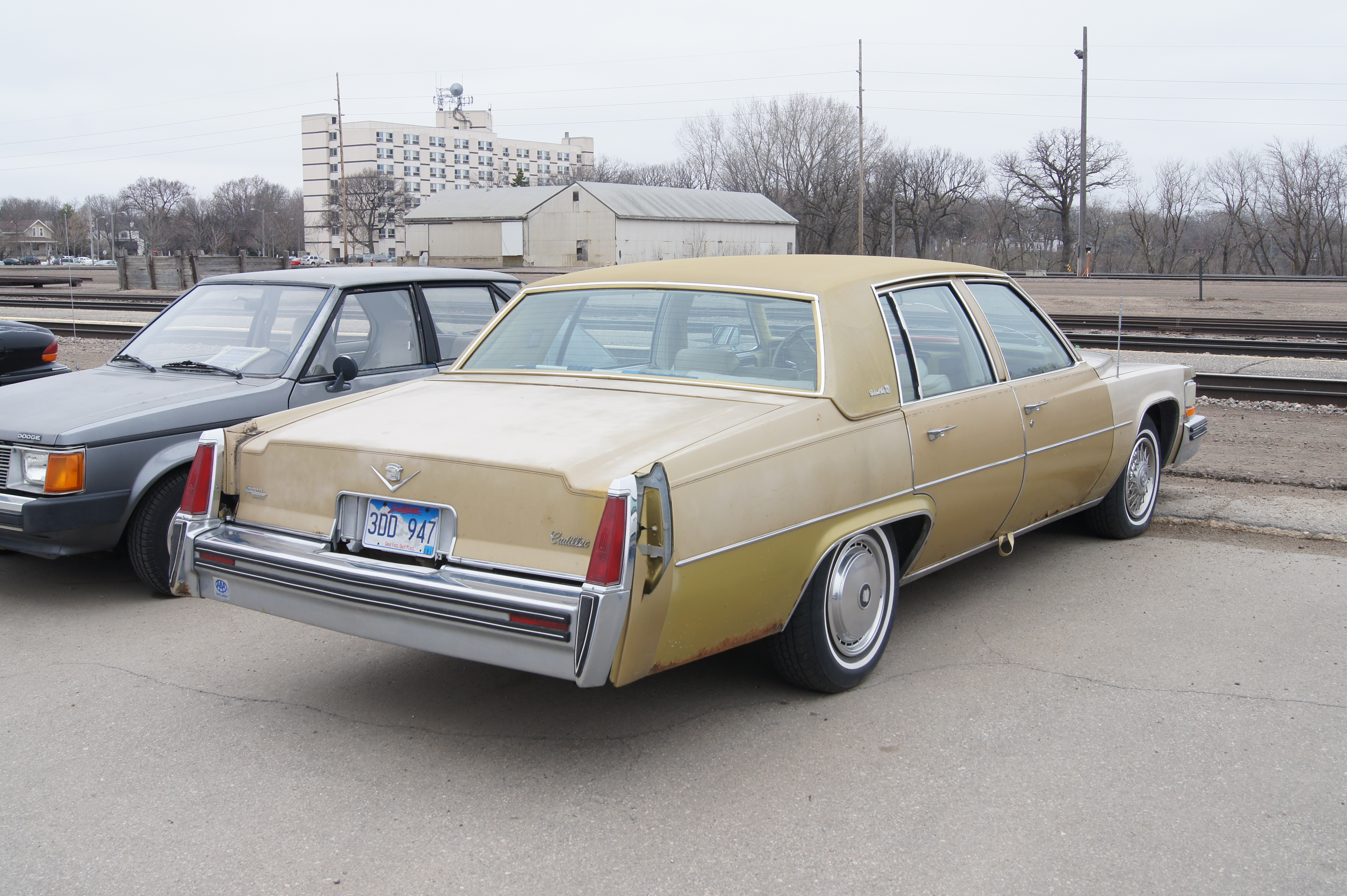 Cadillac Sedan de Ville